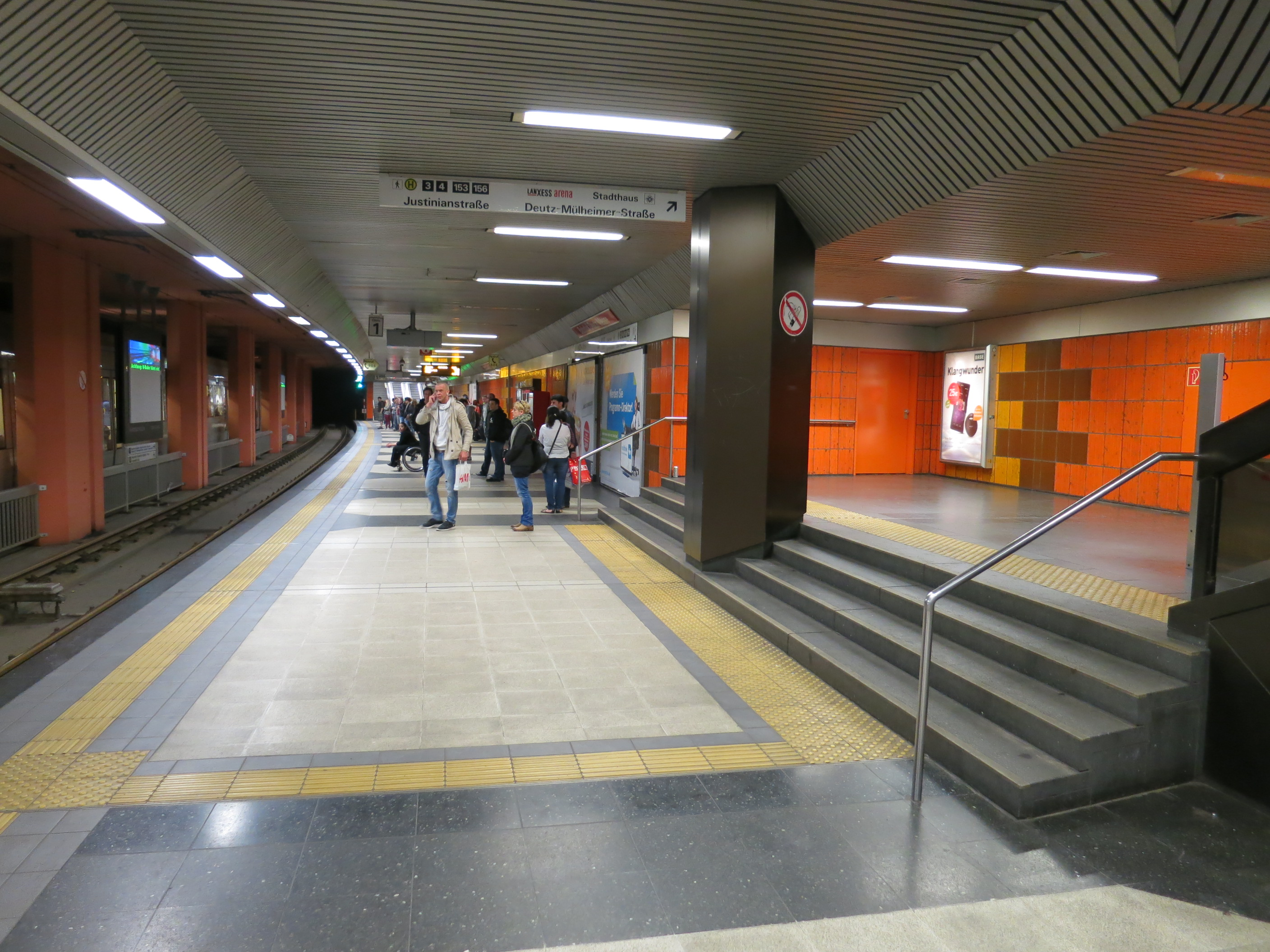 Stadtbahnhaltestelle Deutz/Messe der Linien 1 und 9 in Köln. Entsprechend der Auslegung für hochflurigen Stadtbahnbetrieb enden die Rolltreppen 90 Zentimeter oberhalb der Schienenoberkante, das eigentliche Bahnsteigniveau wird über vier Treppenstufen erreicht.